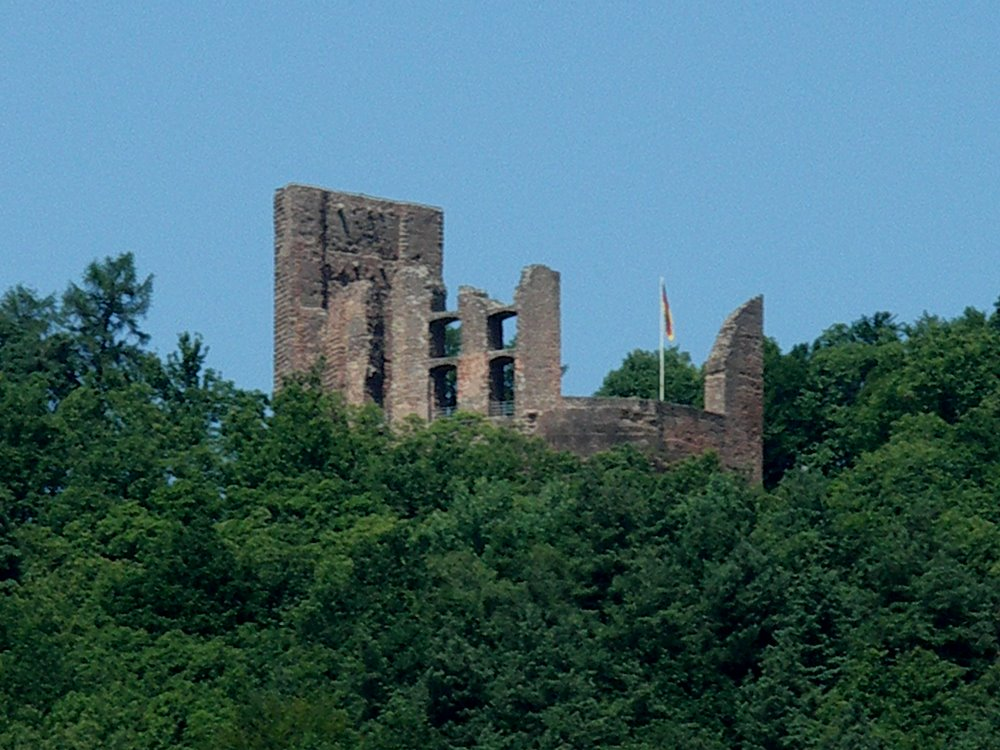 Ramburg, Blick von Ramberg aus. Fotograf oder Zeichner: Peter Schmenger